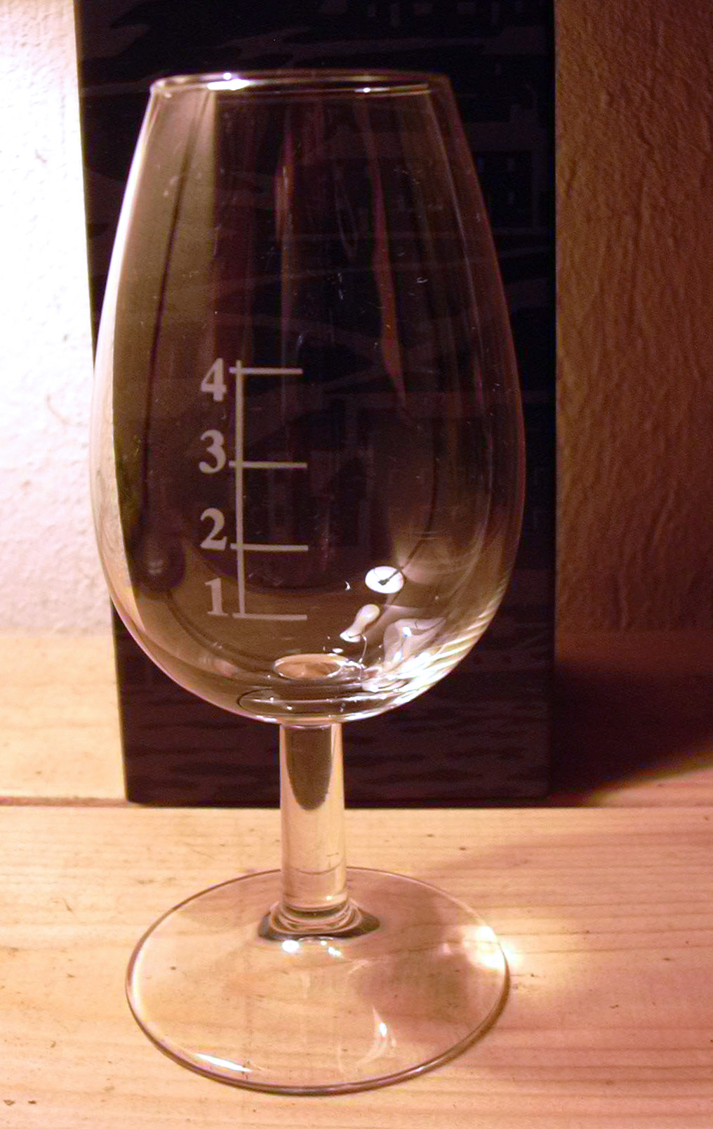 Nosing Gläser werden von professionellen Whisky-Verkostern (Leute, die entweder Whiskys für Handelshäuser oder Zeitschriften beurteilen oder Verschnitte verschiedener Whiskysorten für Blends vornehmen) verwendet.Die sich nach oben verjüngenden Gläser konzentrieren das Aroma optimal. Die Mischstriche erleichtern es, Whisky in einem exakt bestimmten Verhältnis mit Wasser zu verdünnen.